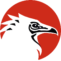 O Abutre do Egipto ou Britango Neophron percnopterus, ave necrófago presente entre março e setembro, período após o qual emigra para África central, foi escolhido como símbolo do PNDI. Trata-se de uma espécie ameaçada, com parte significativa da população nacional a nidificar nas arribas do Douro e Águeda em cavidades rochosas, como fendas ou pequenas grutas. O Abutre de Egipto associa-se também à região planáltica contígua onde a cerealicultura e pecuária extensivas lhe permitem obter e localizar com facilidade os cadáveres de animais de que se alimenta.